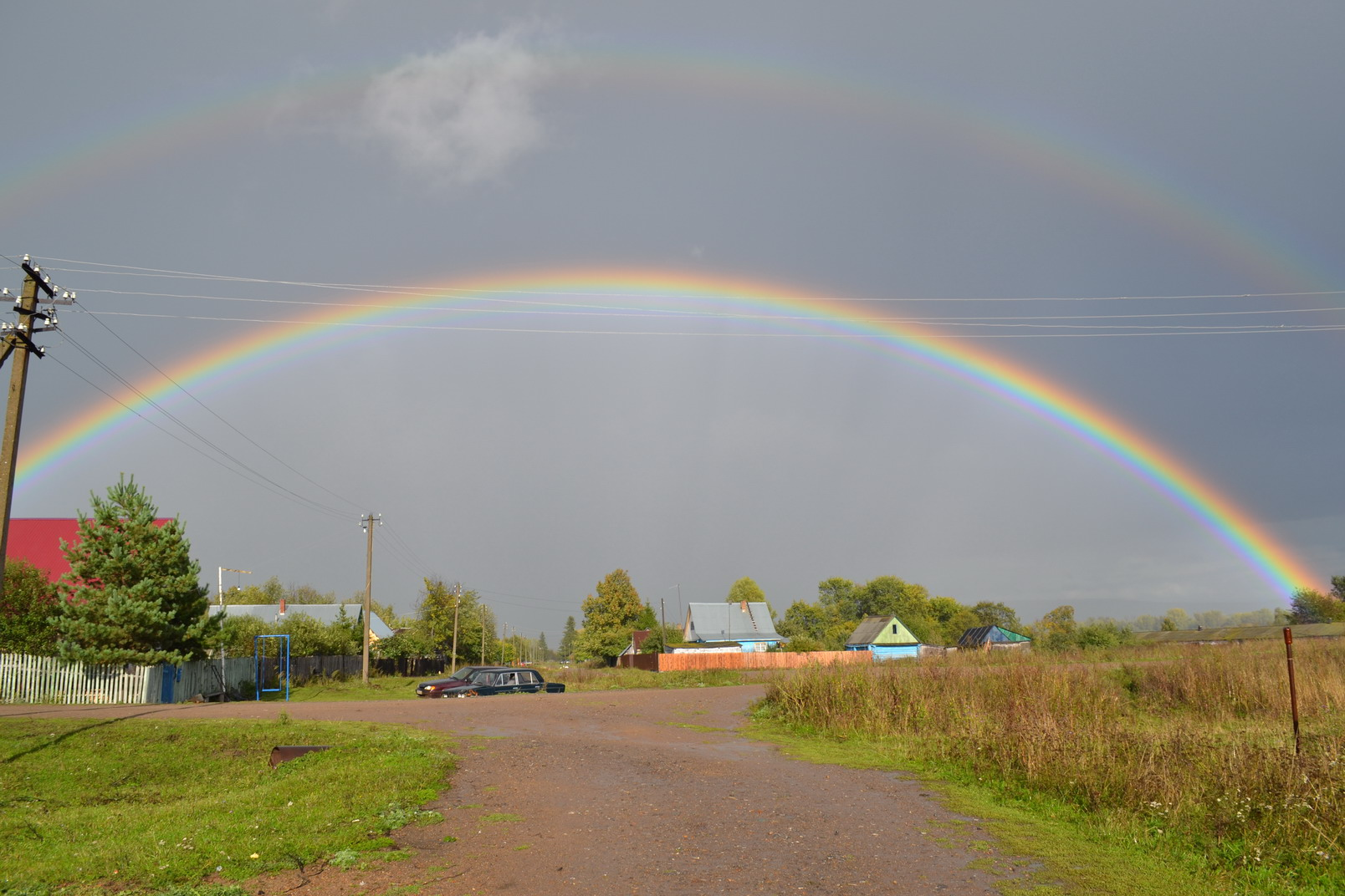 Деревня Богдановское, 2016 г, "Радуга над Богдановкой"